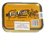 1792 флейк